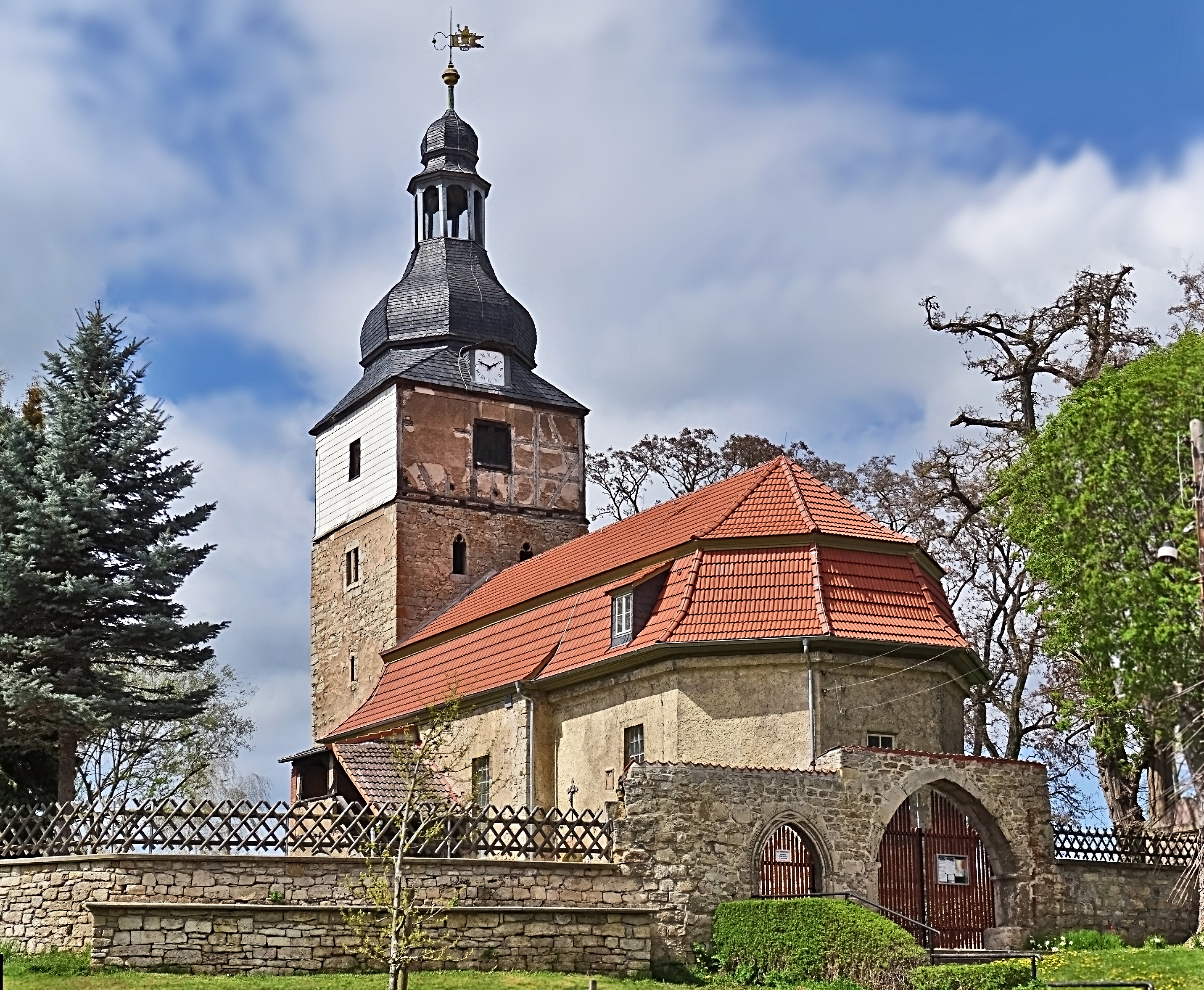 Dorfkirche St. Petri in Trebra von Süden